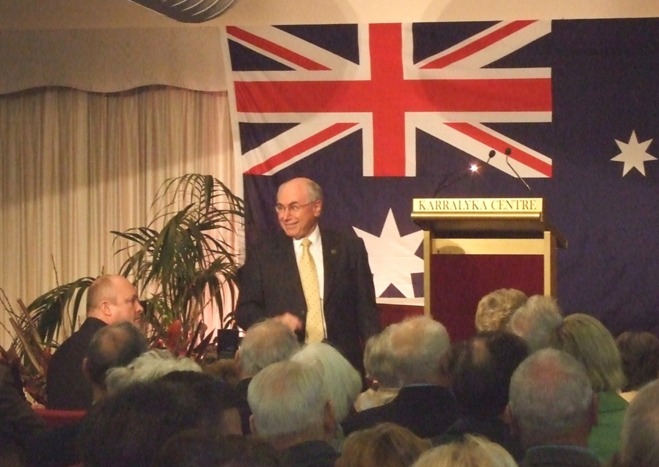 John Howard, 31 August, 2007